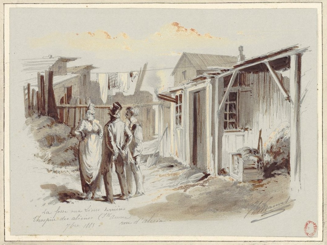 "Fosse aux lions derrière l'hospice des aliénés (Sainte-Anne)", dessin de Jules-Adolphe Chauvet, 1883.